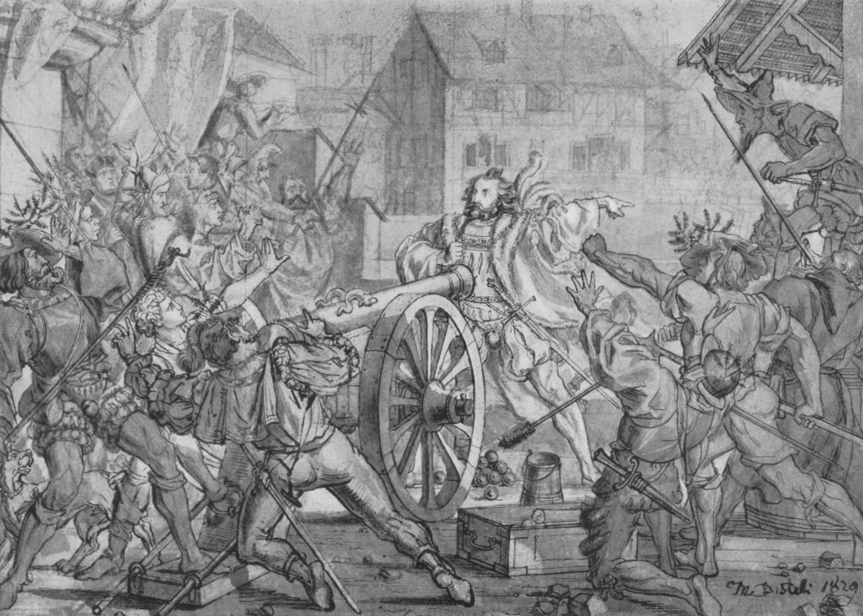 Washed pen drawing "Niklaus Wengi hält die Solothurner 1533 vom Religionskrieg zurück" by Swiss artist Martin Disteli (1802-1844).